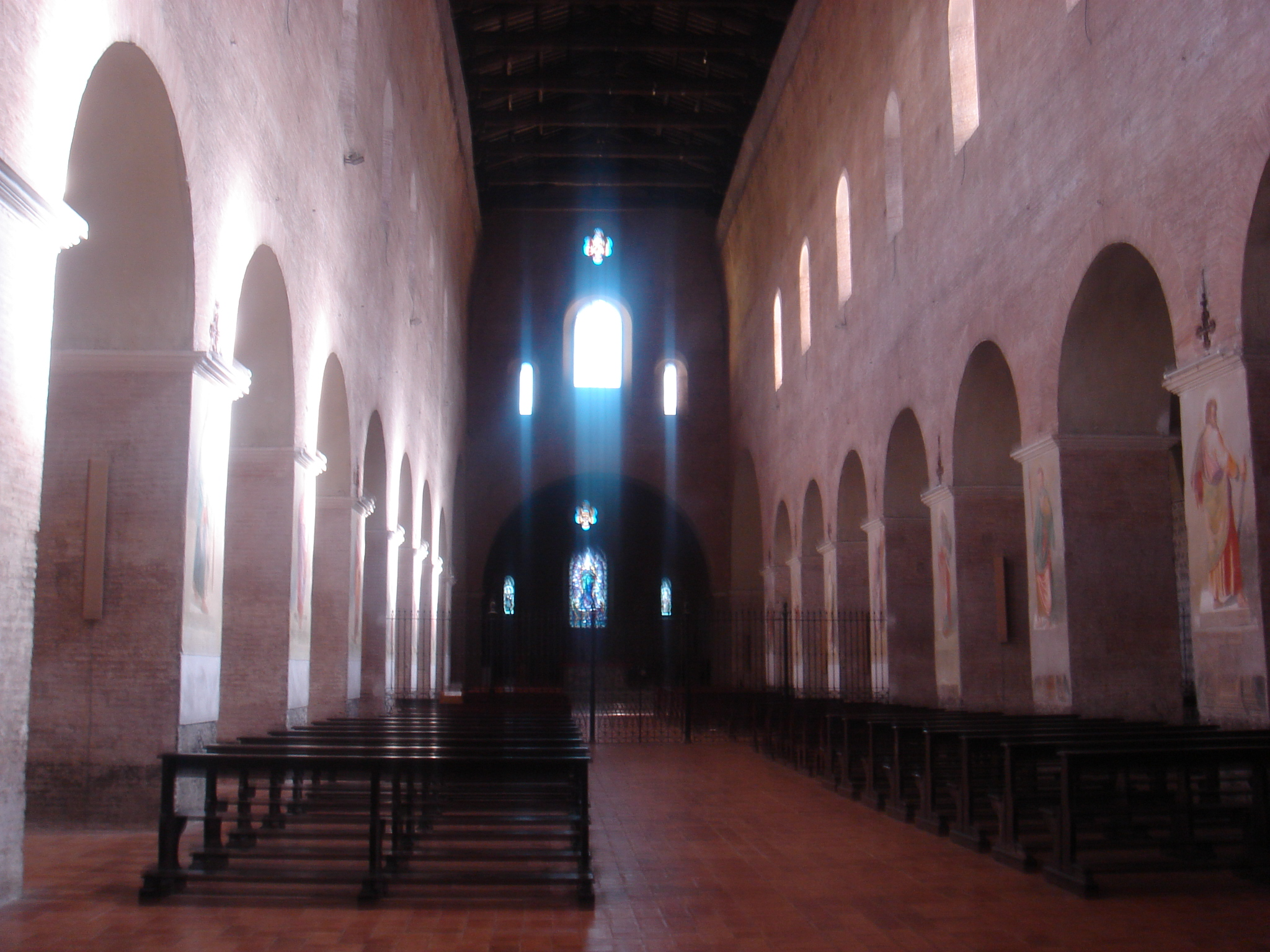 Roma, Abbazia delle Tre Fontane: chiesa abbaziale, interno